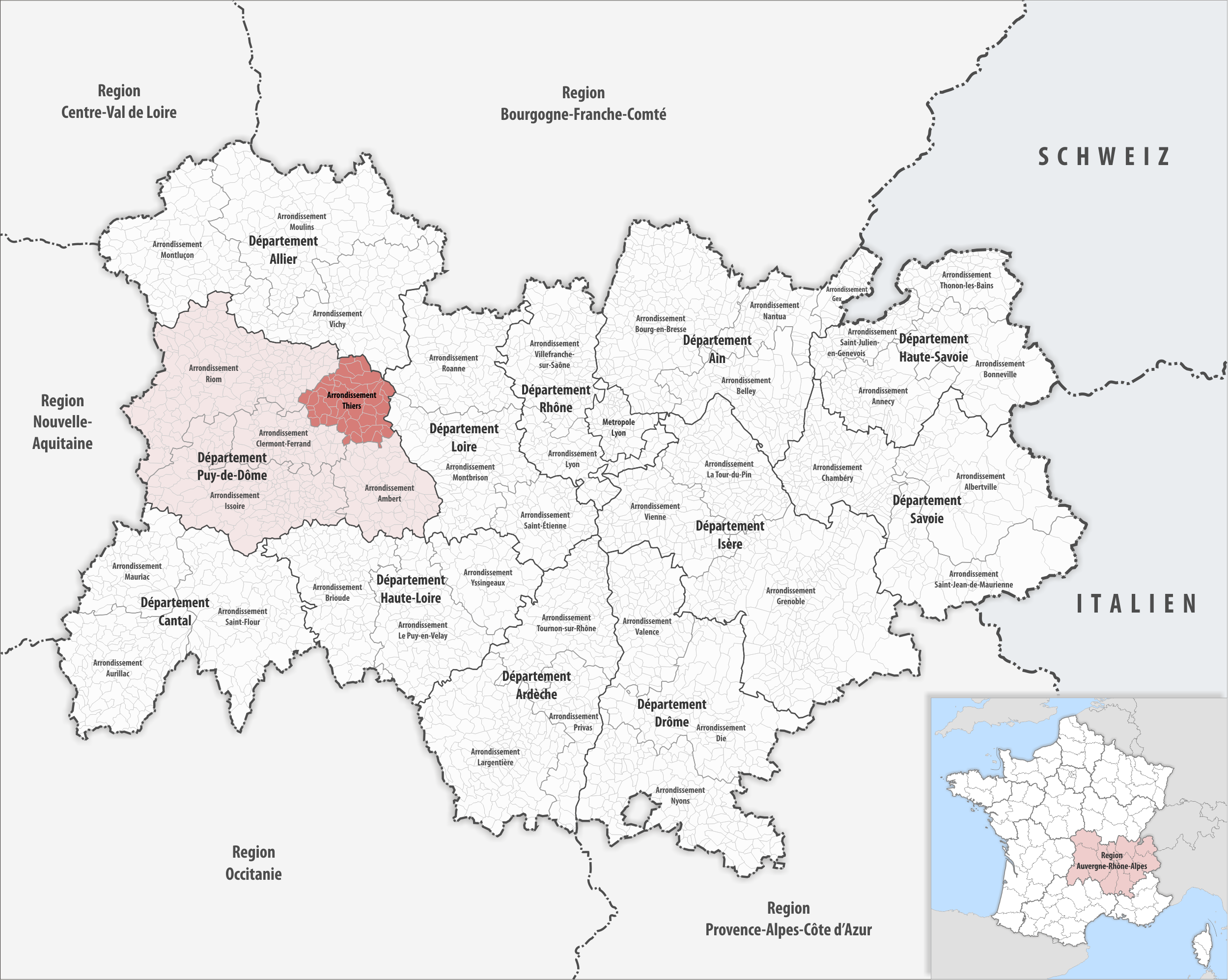 Lage des Arrondissements Thiers